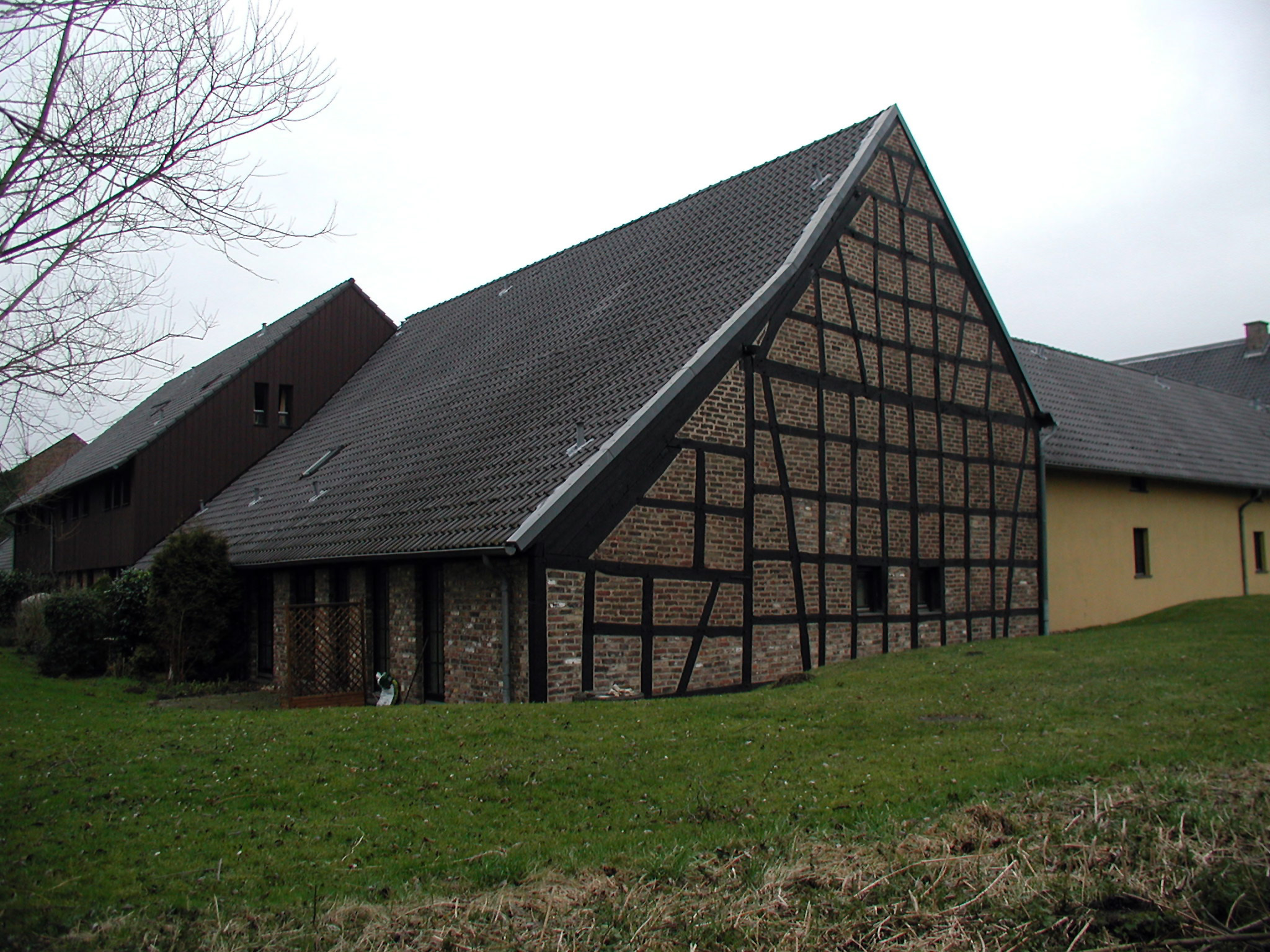 Palmersdorfer-Hof, Brühl. Fachwerk um 1700